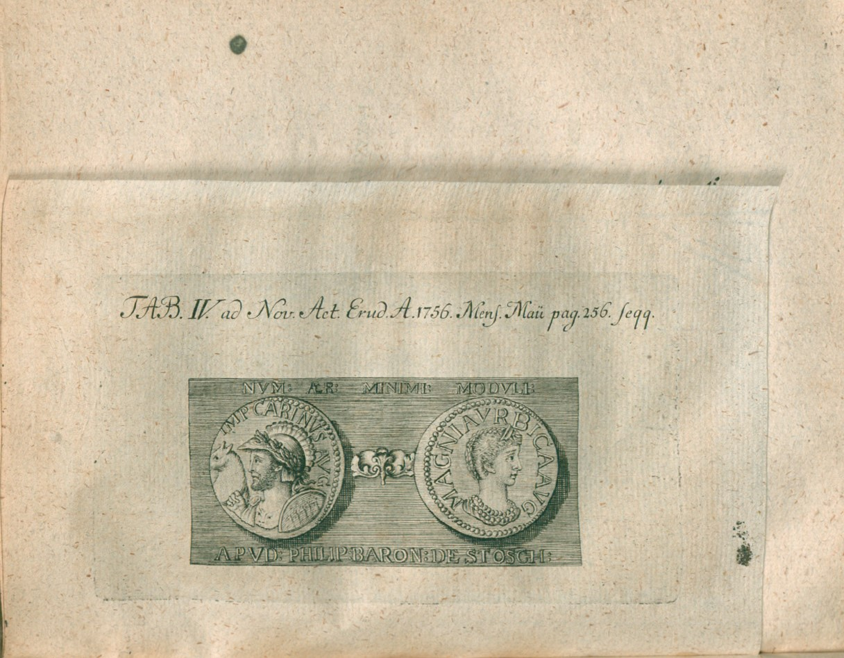 Illustration